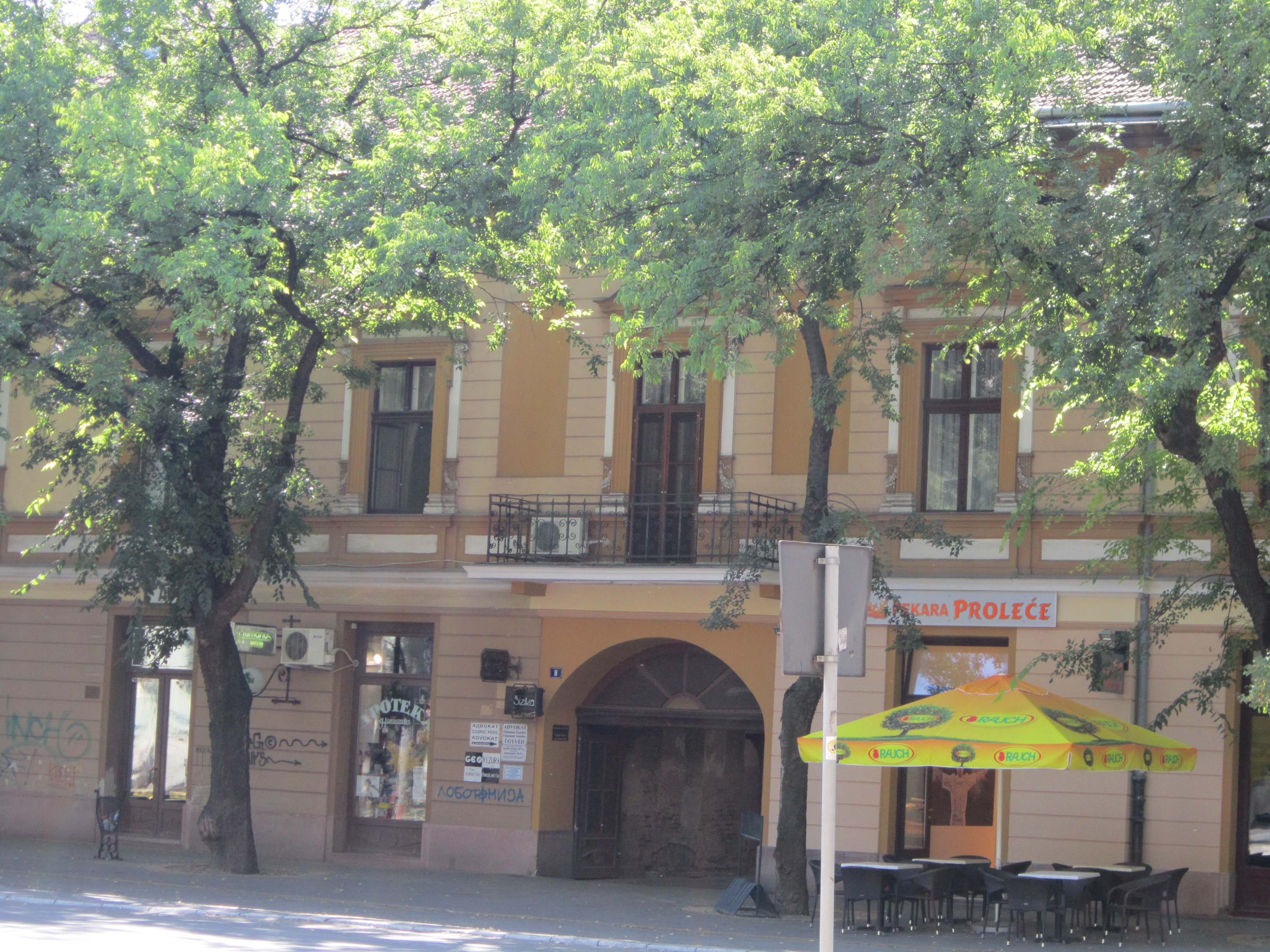 Зграда у Ул. Штросмајерова бр. 8 , Суботица